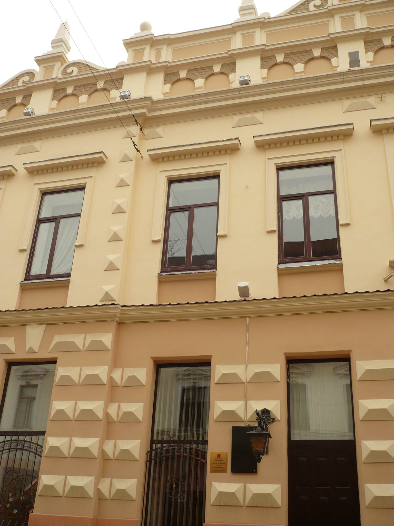 Czerniowce, Dom, Polski, 12.7.2009